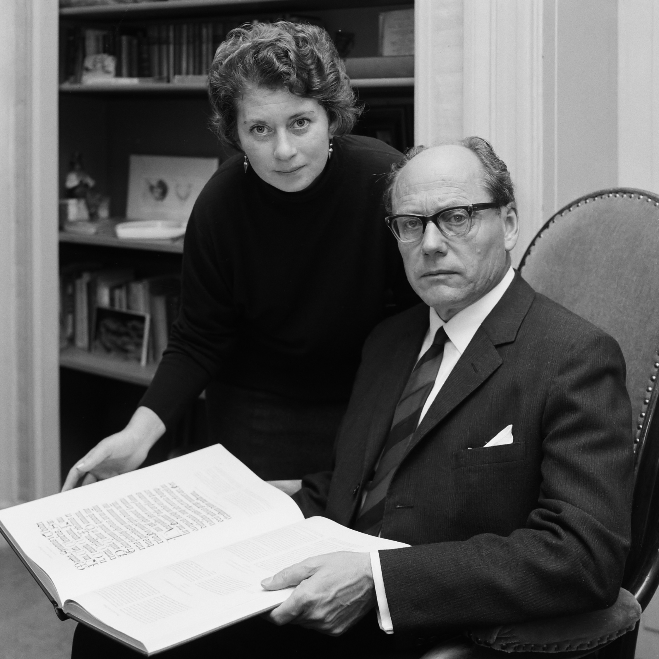 Prof. Wytze Hellinga met zijn echtgenote Lotte Querido. (Verschillende bronnen noemen 1973 als huwelijksjaar. Lotte Querido was dus ten tijde van de foto niet de echtgenote van prof. Hellinga) 10 oktober 1966